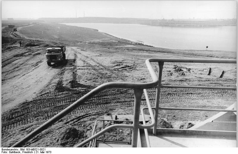 Leipzig, Rekultivierung ADN-ZB Gahlbeck 21.5.73 Bez.Leipzig:Zur" Woche der sozialistischen Landeskultur 1973".So sah es noch vor wenigen Wochen im größten Naherholungszentrum der Messestadt aus.Umfangreiche Erdarbeiten waren erforderlich, um auf dem Gelände der ehemaligen Tagebaus Kulkwitz und Miltitz die Vorraussetzungen zu schaffen, daß der Badesee(halb so groß wie der Berliner Müggelsee) bald genutzt werden kann.Acht Kilometer vom Stadtzentrum Leipzigs entfernt, ist das Erholungsgebiet leicht zu erreichen.(Vergl.hierzu M0521-22N)